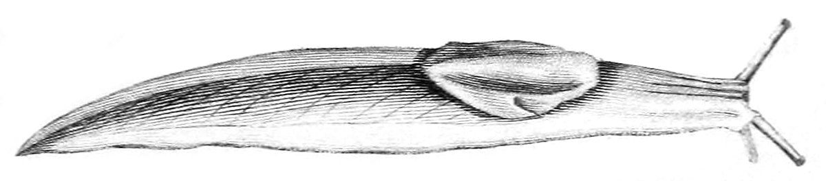 Abb 1 Tafel 63 aus Millet, P. 1843: Description de plusieurs espèces nouvelles de mollusques de la France. In: Magasin de zoologie, d'anatomie comparée et de palaeontologie. Bd. 2, Nr. 5, Paris, S. 1-4, Pl. 63-64 ( abgerufen am 1. Juni 2014).